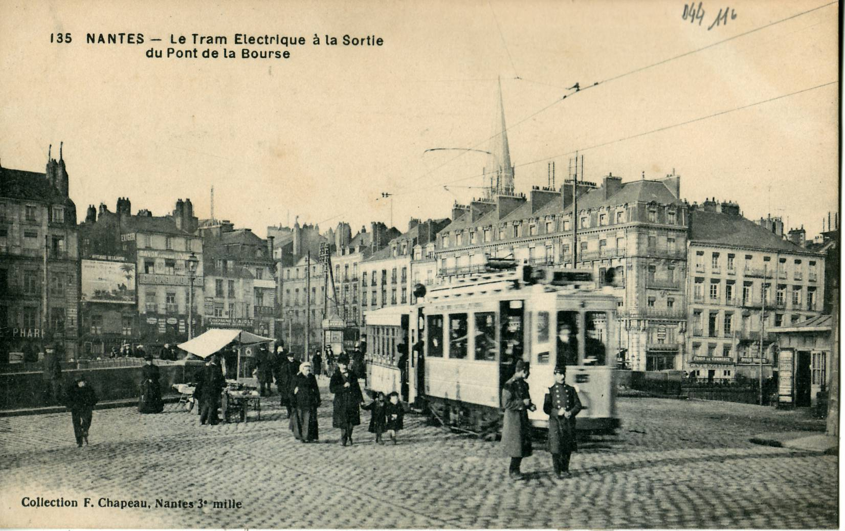 Carte postale ancienne éditée par Chapeau à Nantes, n°135 Nantes : Le tram électrique à la sortie du Pont de la Bourse